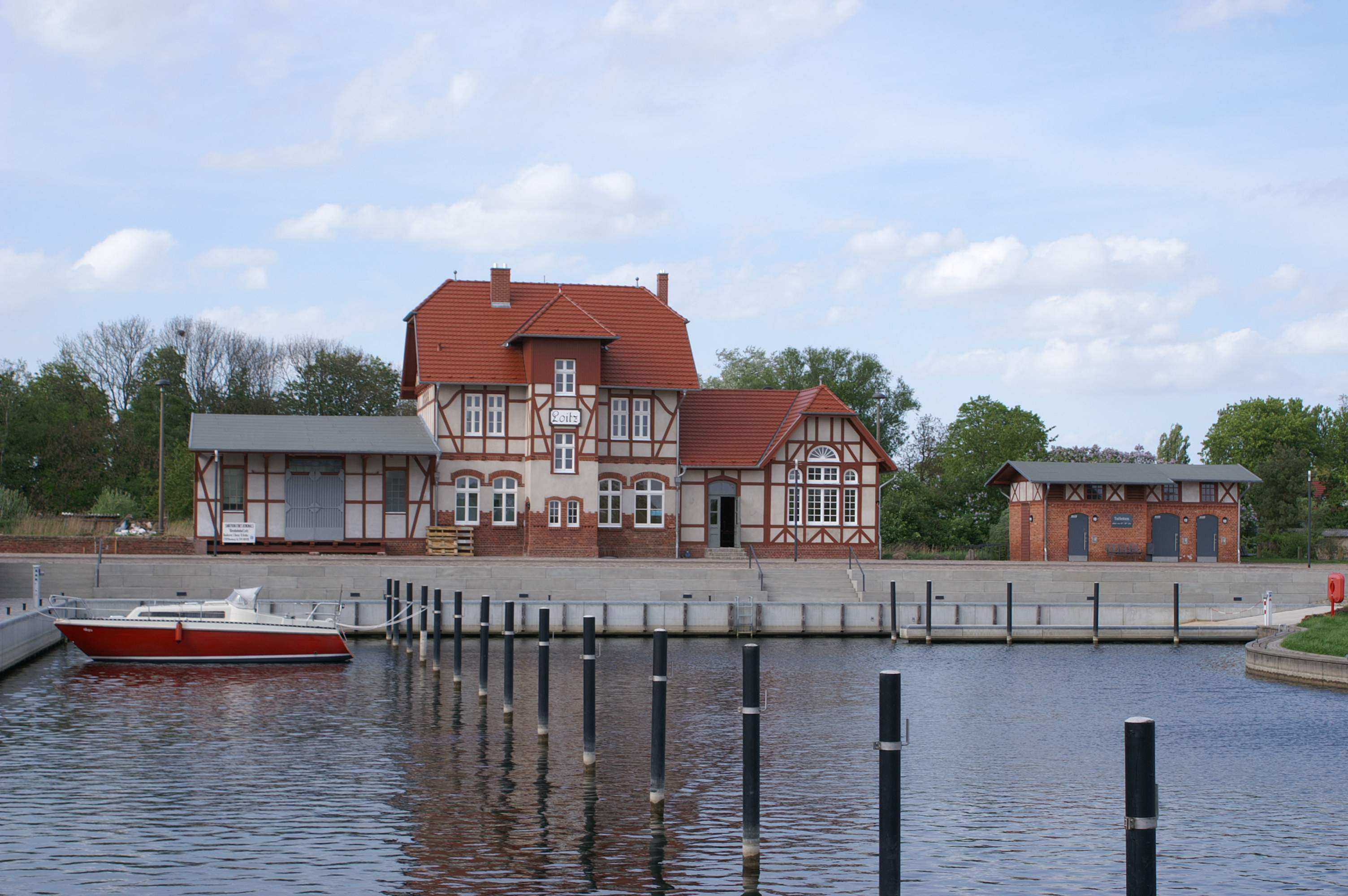 Ehemaliger Kleinbahnhof Loitz - heute Marina